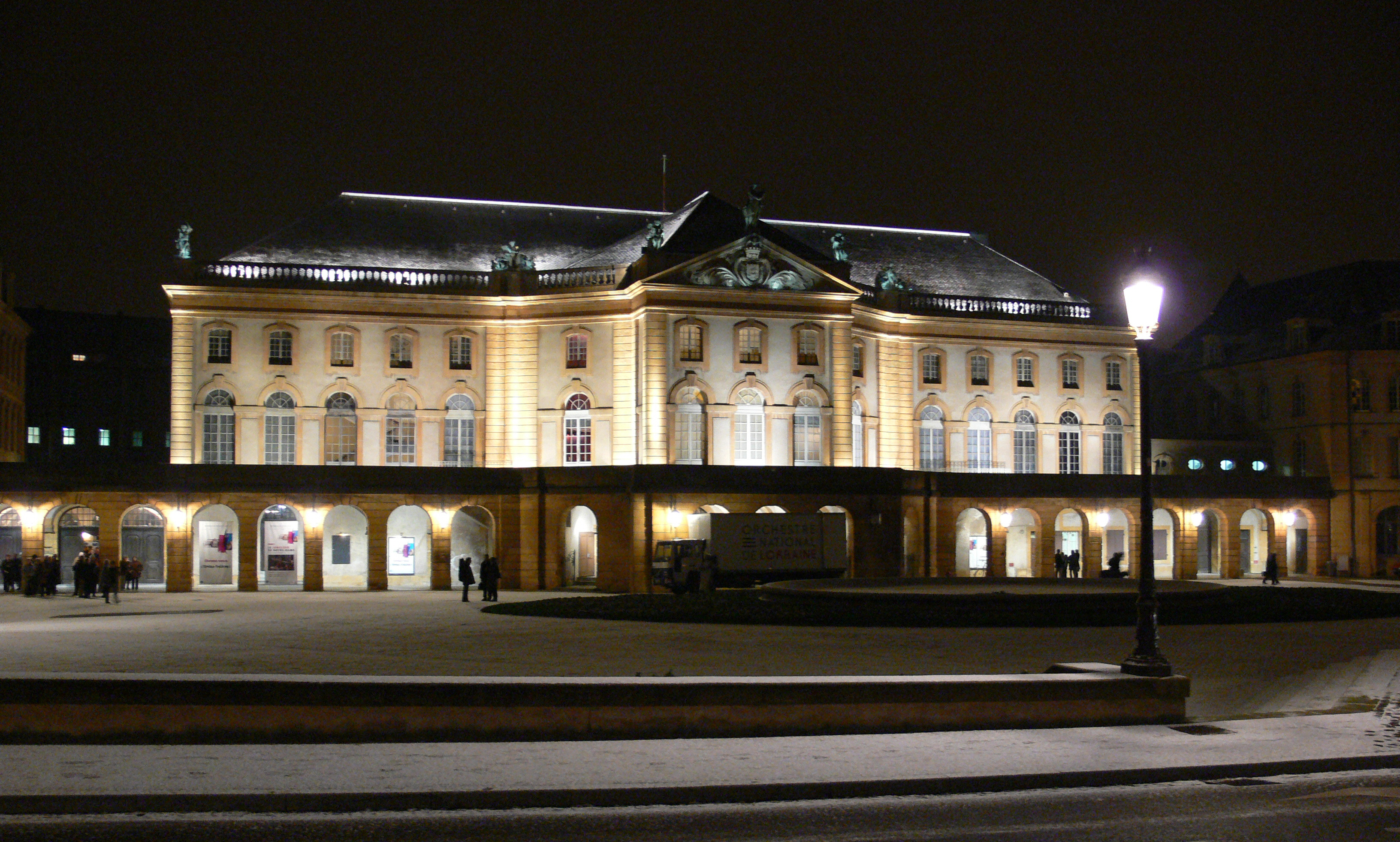 Metz, France: Théatre